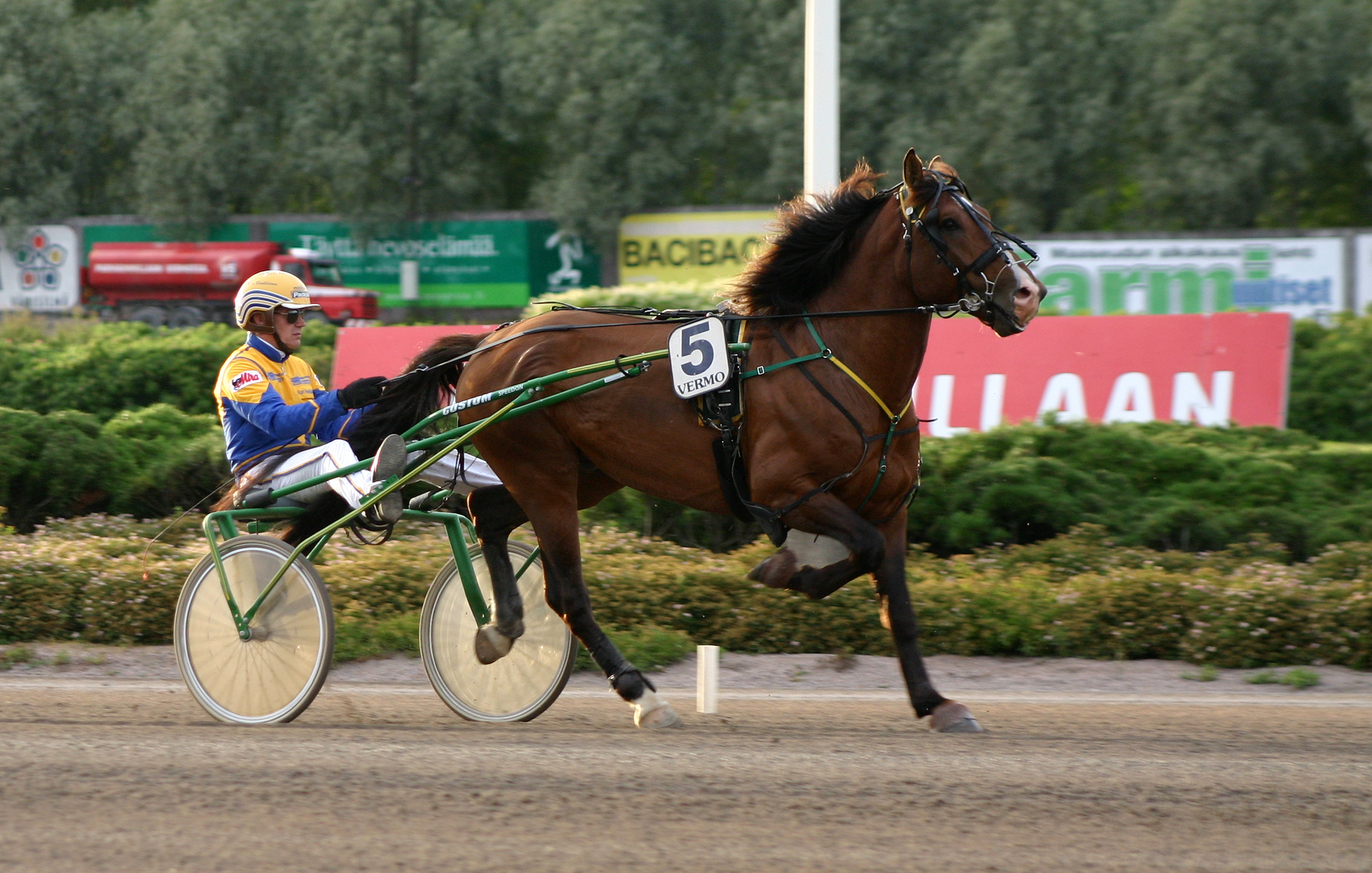 Stallion Kume driven by Kari Venäläinen.